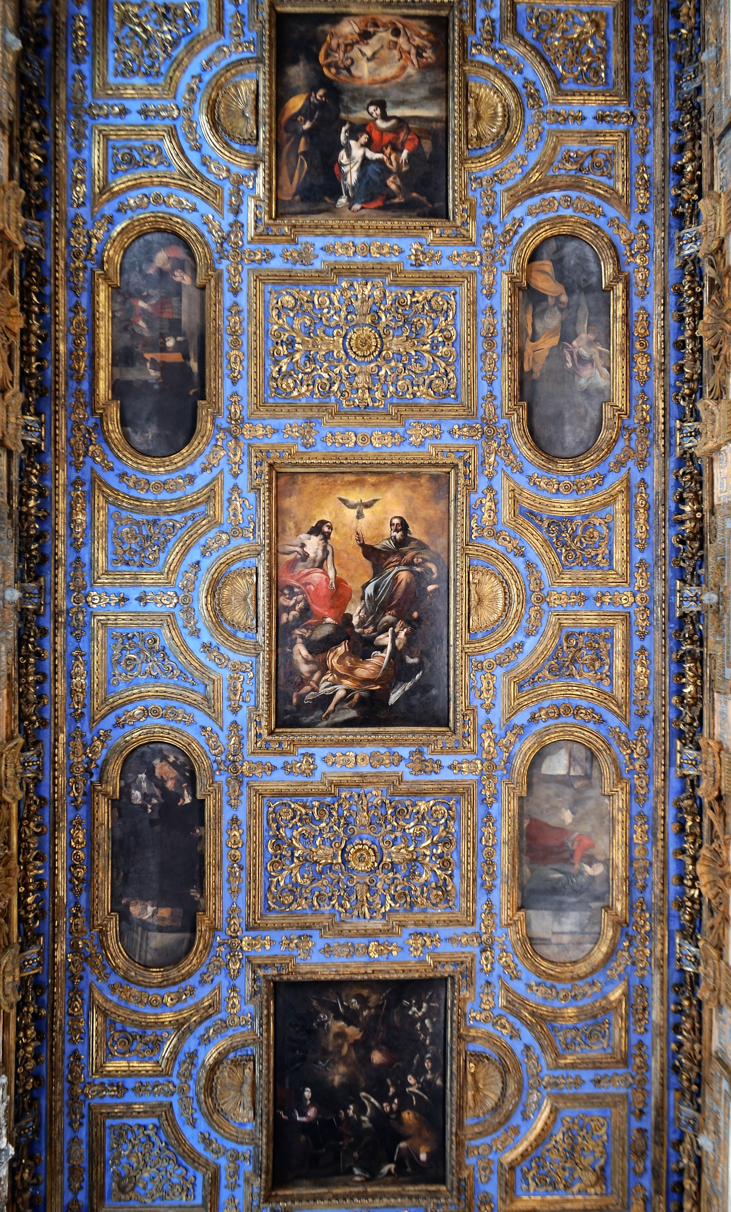 Chiesa dei Santi Marcellino e Festo di Napoli - Volta